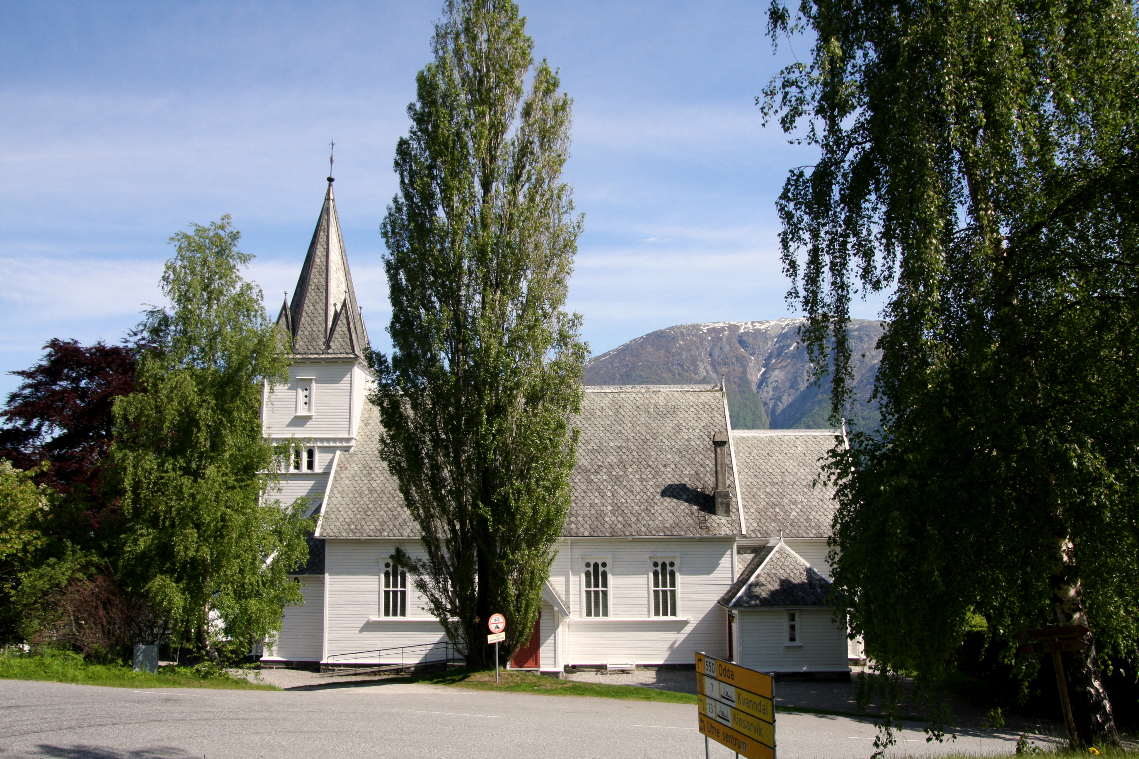 Utne kirke